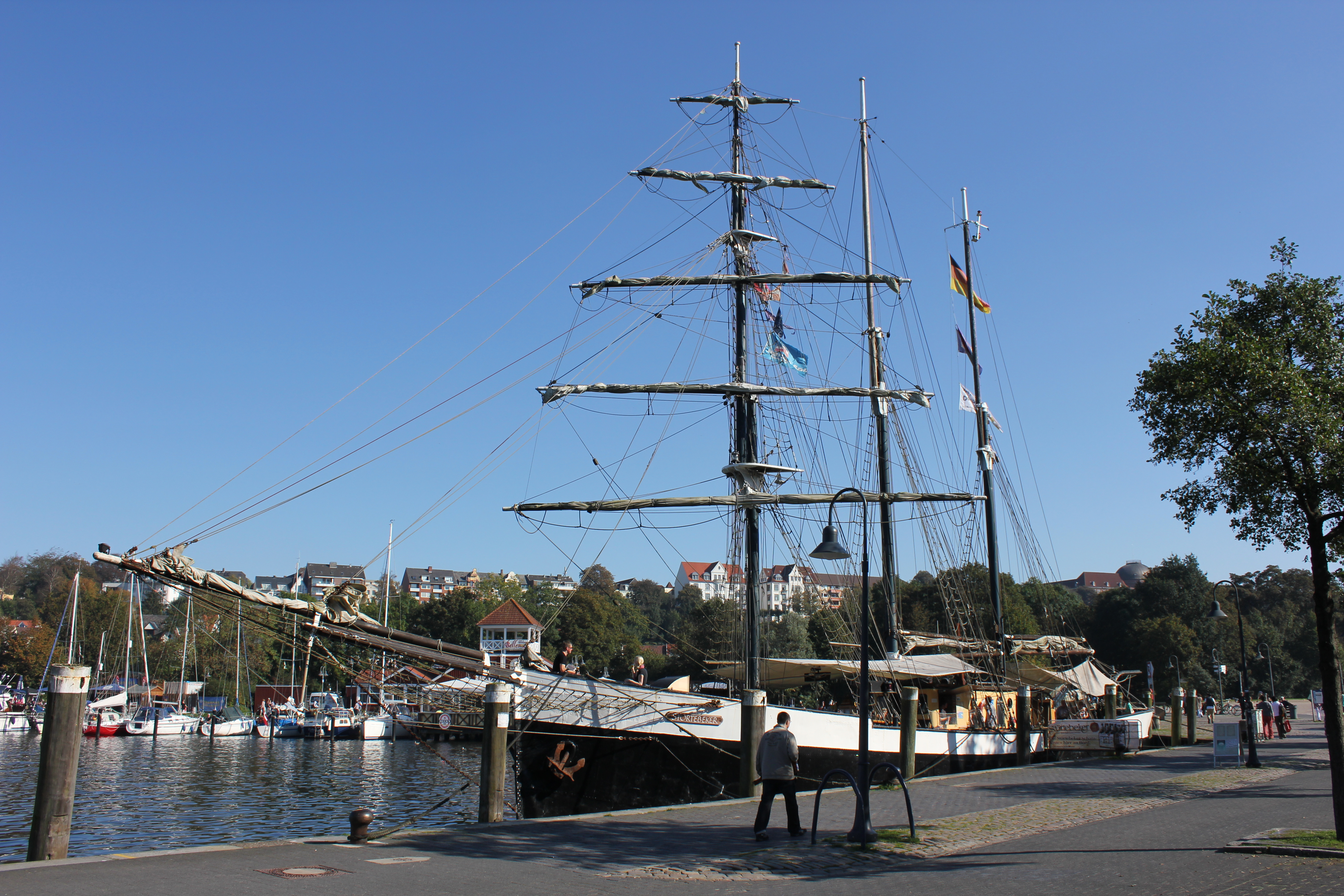 Schiff Störtebeker (1885) in Flensburg - Schiffscafé Störtebeker